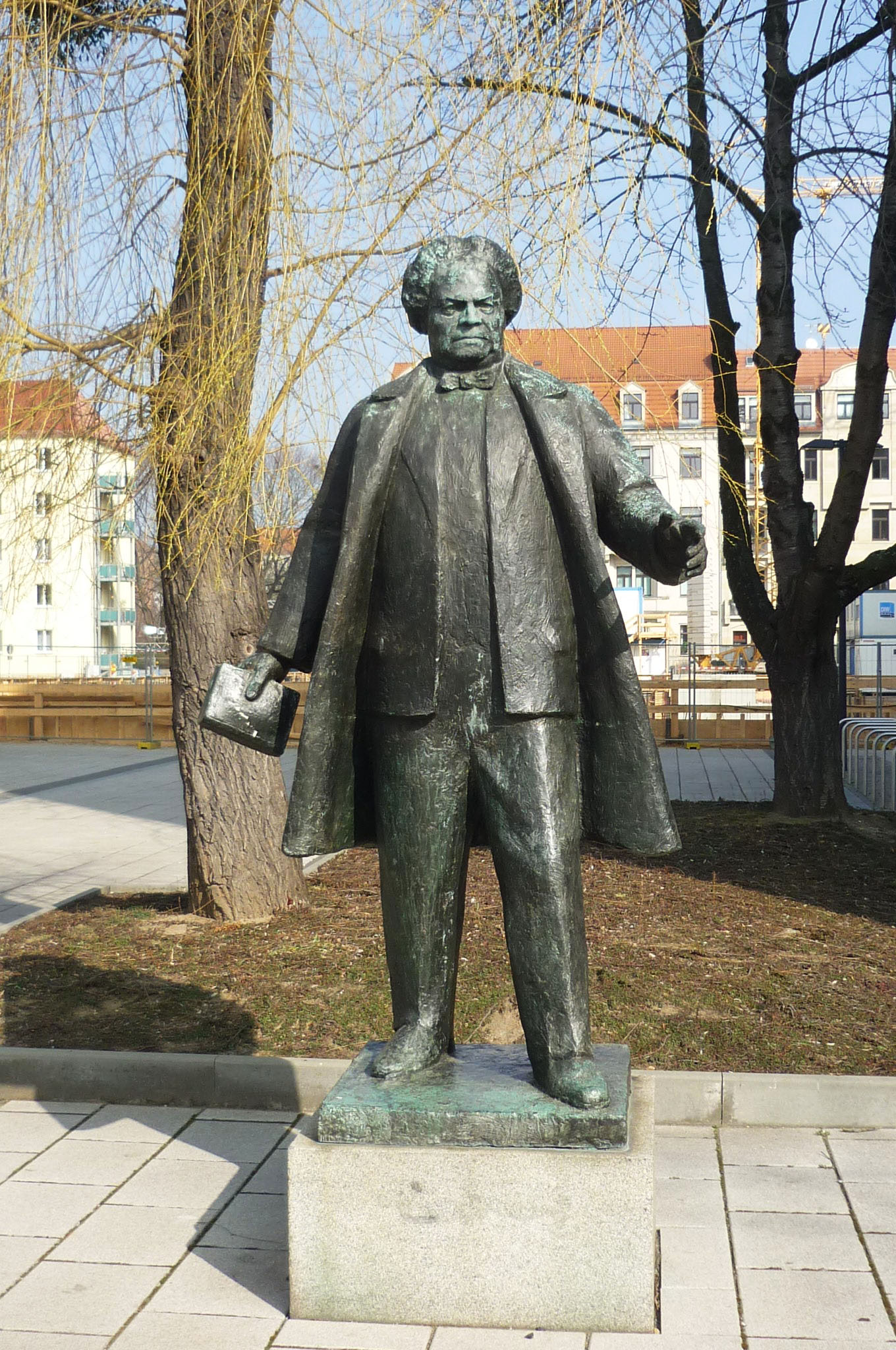 Statue „Martin Andersen-Nexö“ vor dem Gymnasium „Martin Andersen Nexö“ in der Haydnstr. 49 in Dresden-Striesen (urspr. in der Kretschmerstr. In Dresden-Blasewitz)